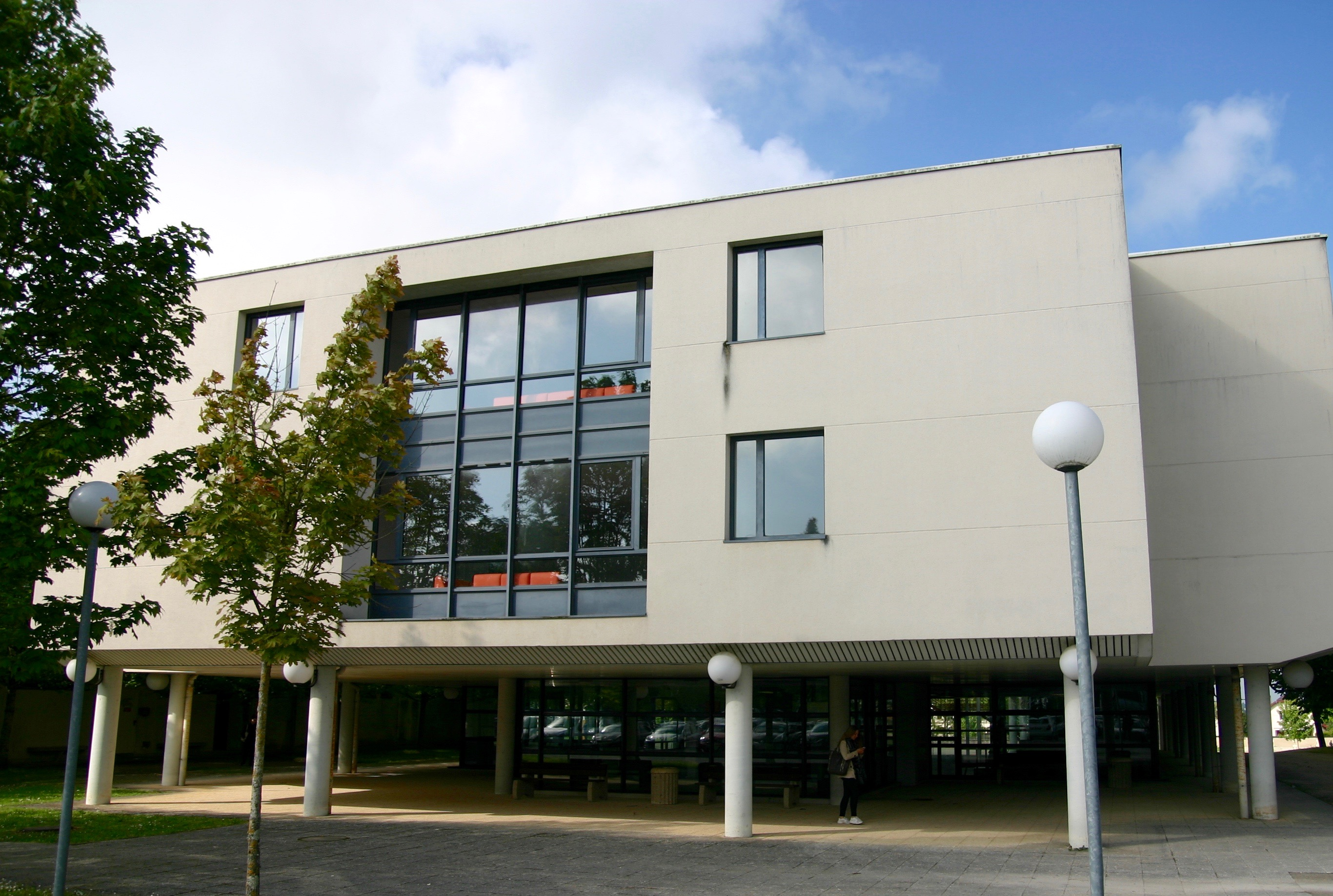 L'internat des filles du Lycée Jacques Cœur situé à Bourges France